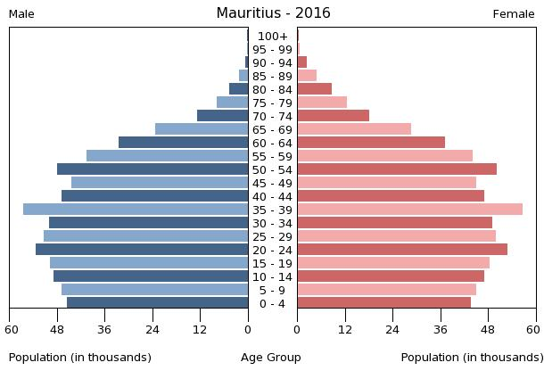 A population pyramid illustrates the age and sex structure of a country's population and may provide insights about political and social stability, as well as economic development. The population is distributed along the horizontal axis, with males shown on the left and females on the right. The male and female populations are broken down into 5-year age groups represented as horizontal bars along the vertical axis, with the youngest age groups at the bottom and the oldest at the top. The shape of the population pyramid gradually evolves over time based on fertility, mortality, and international migration trends.